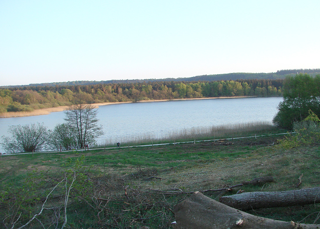 Østenden med pramstien i på nærmeste bred. Silkeborg Langsø, Jylland, Denmark